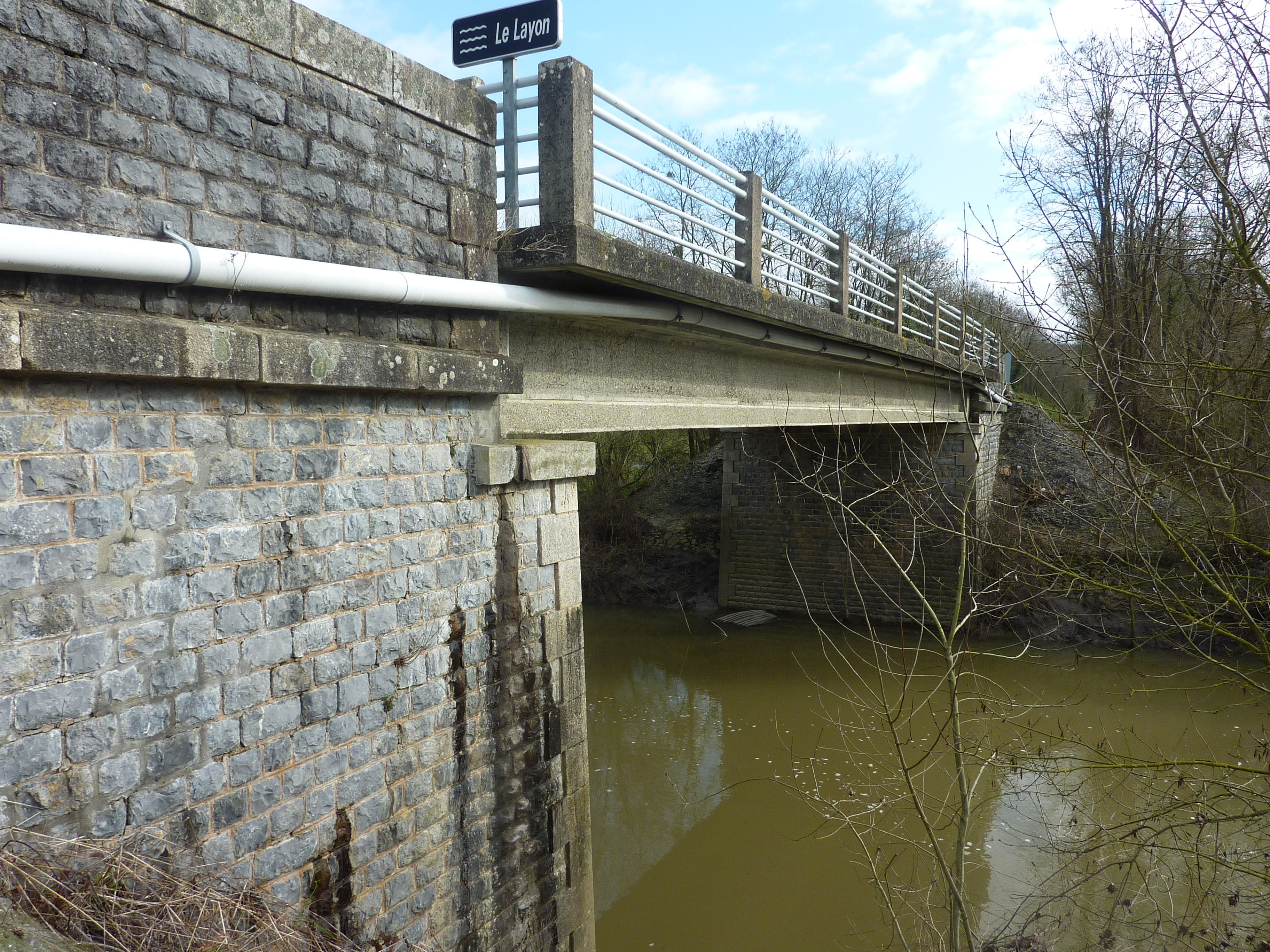 Pont sur la route D121 à Chaudefonds-sur-Layon (Maine-et-Loire, France). Vue d'ensemble.